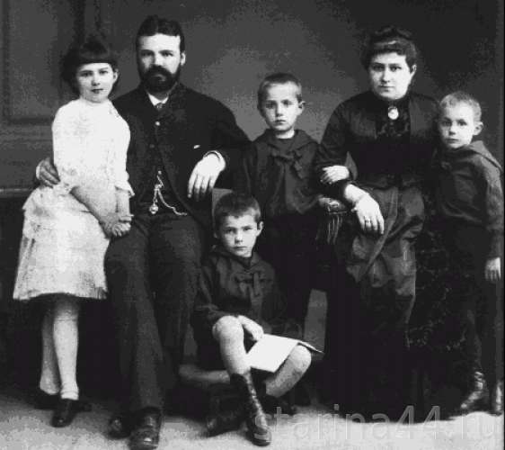 Москва. Семья книгоиздателя Сытина Ивана Дмитриевича - жена Евдокия Ивановна и дети (Николай,Василий,Владимир,Мария). Фото сер.1880-х гг.